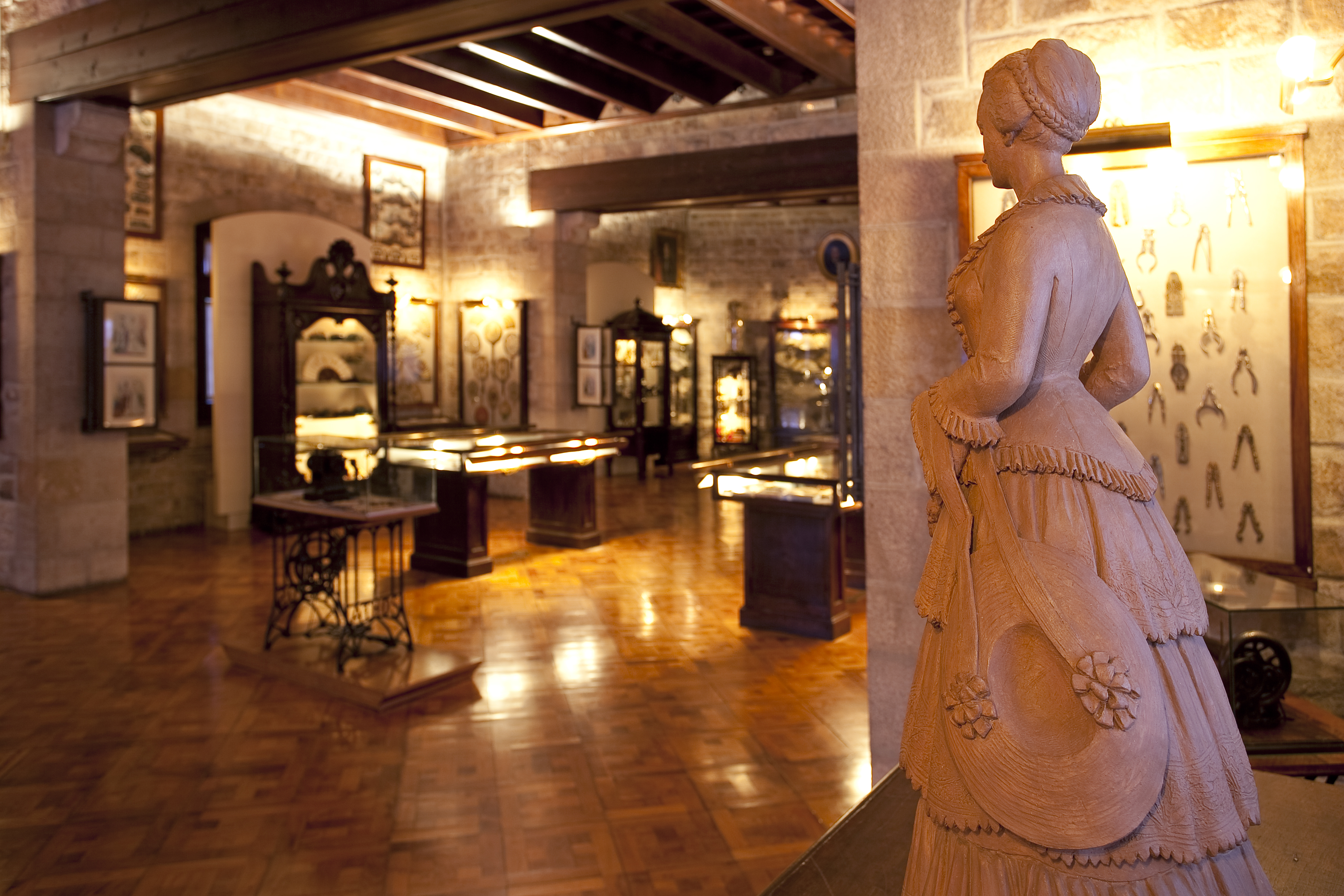 Sala 5 Gabinet col·leccionsita - Fot. GUILLEM F-H.jpg